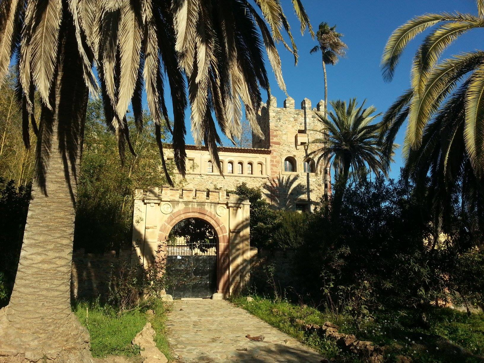 Façana del Mas de Sant Rafael